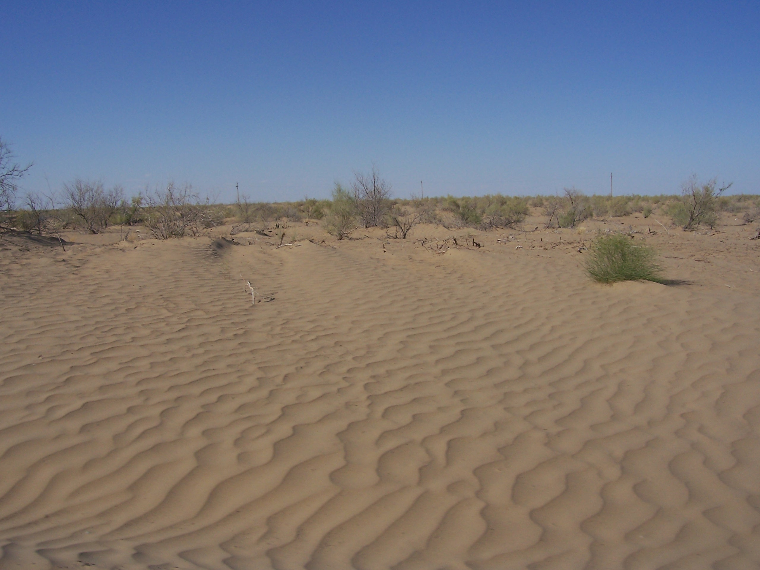 Kyzyl Kum (Ouzbékistan)